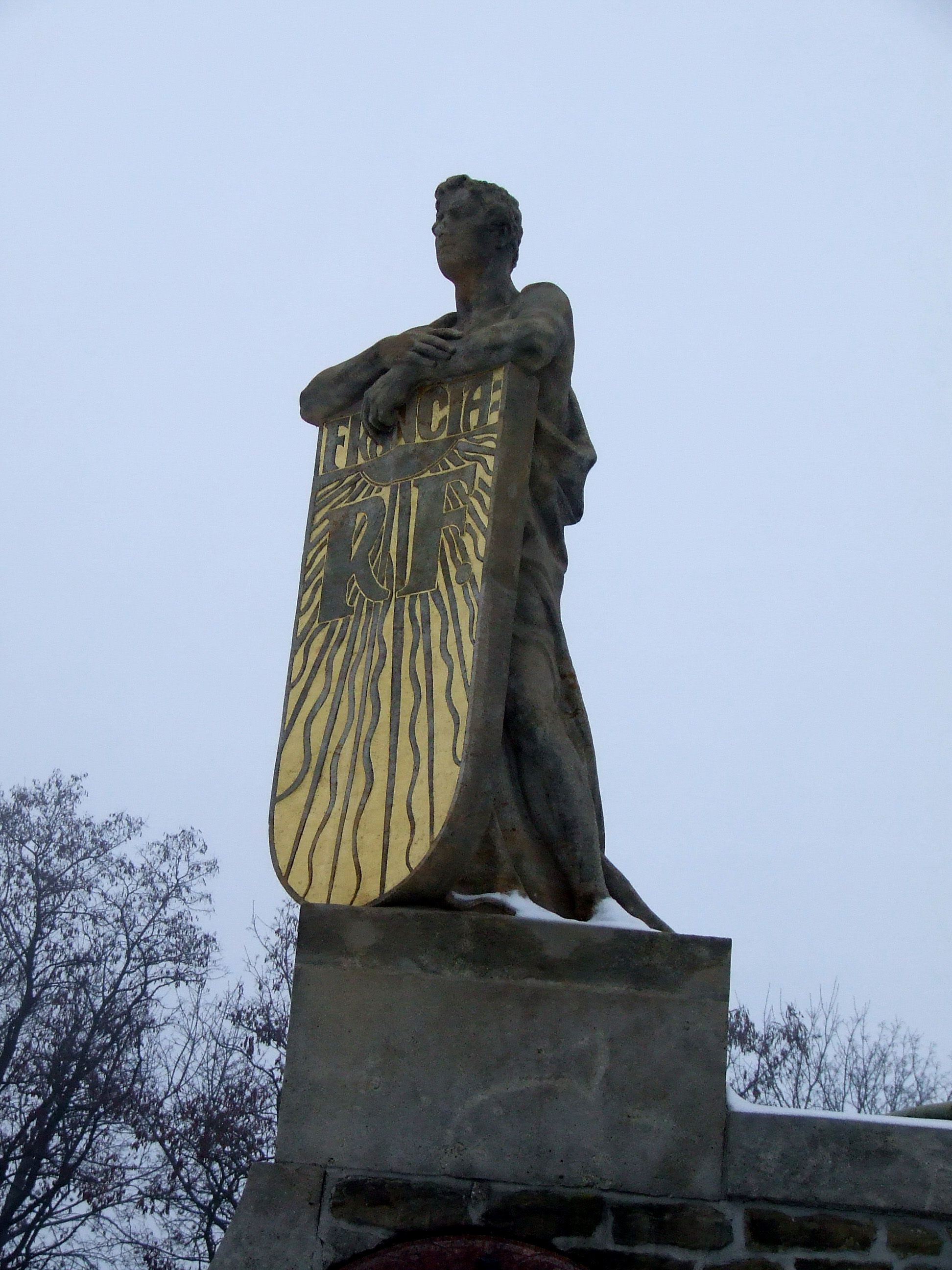 The Napoleon's battle near Austerlitz - Slavkov in Czech Republic; detail of Tomb / detajl spomenika, posvečenega padlim v bitki pri Austerlitzu - Slavkovu na Češkem (pokrajina Moravska), prikazana ena od udeleženk - Francija